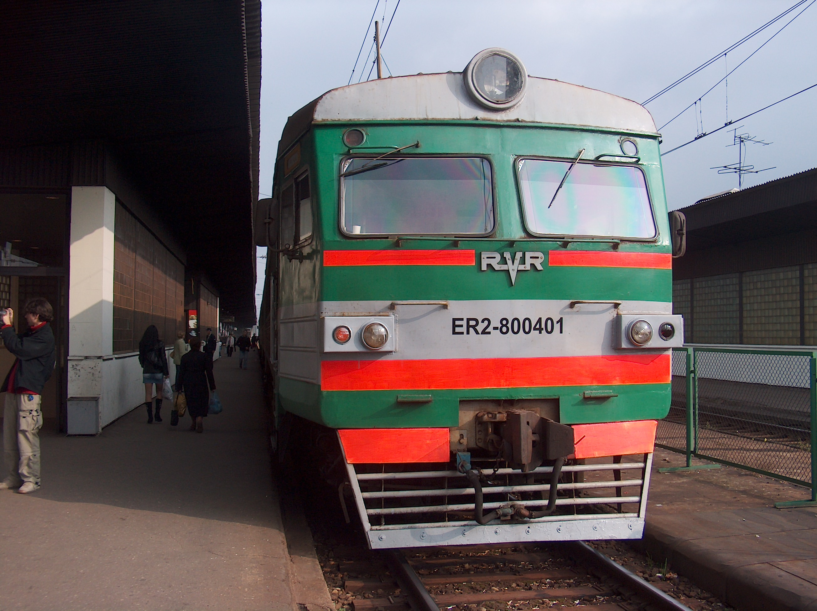 RVR-Triebwagen